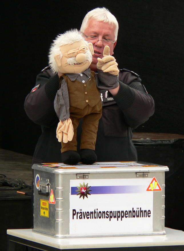 Präventionspuppenbühne Hannover, Fotoaufnahme bei Veranstaltung "Polizei erleben" am 04./05.09.10 in Hannover auf dem Ernst-August-Platz